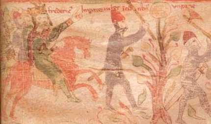 Fridrich Barbarossa na třetí křížové výpravě